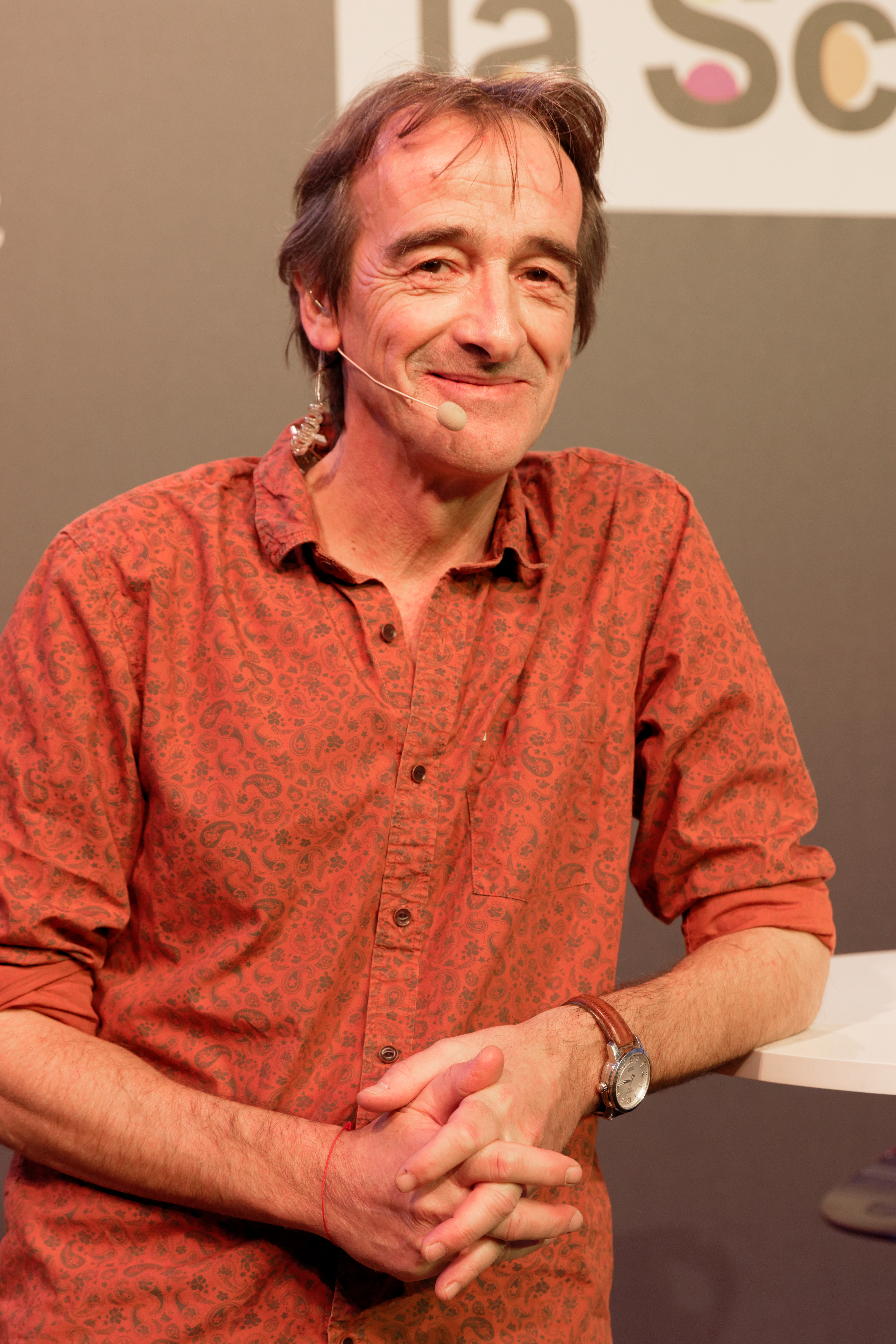 Frédéric Courant lors d'une table ronde pour .l'Esprit sorcier pendant la fête de la science 2016 à la Cité des Sciences et de l'Industrie.